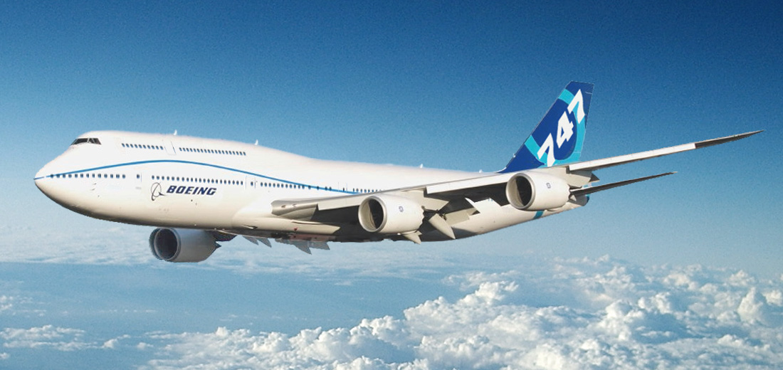 Boeing 747-8F